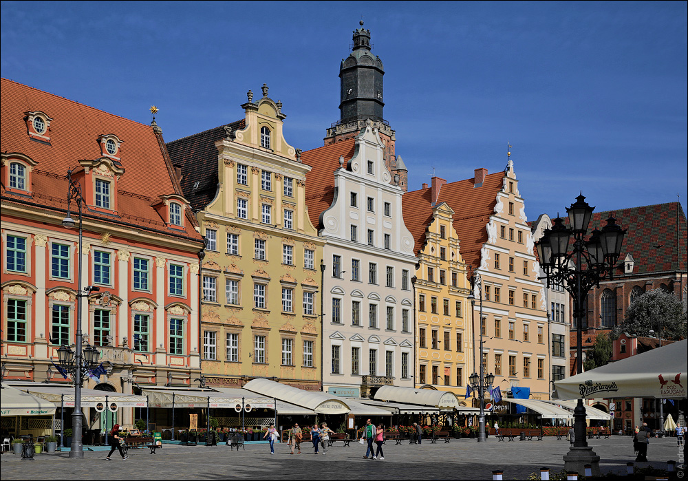 Уроцлаўскія замалёўкі